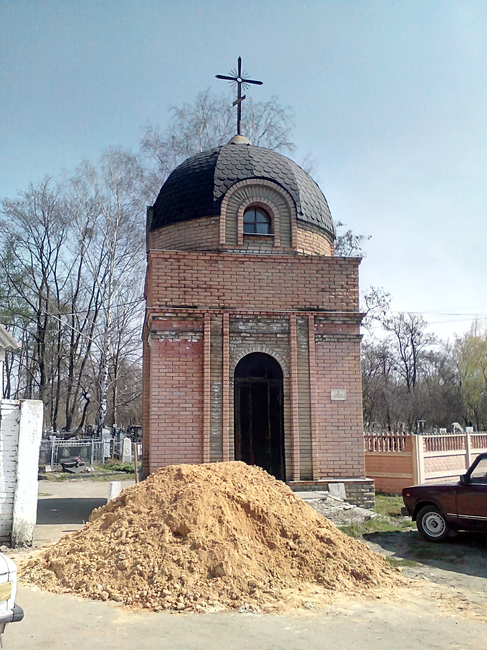 Україна. Харків. Місцевість Пилипівка. Каплиця (10 кладовище). Побудовано у 2004.